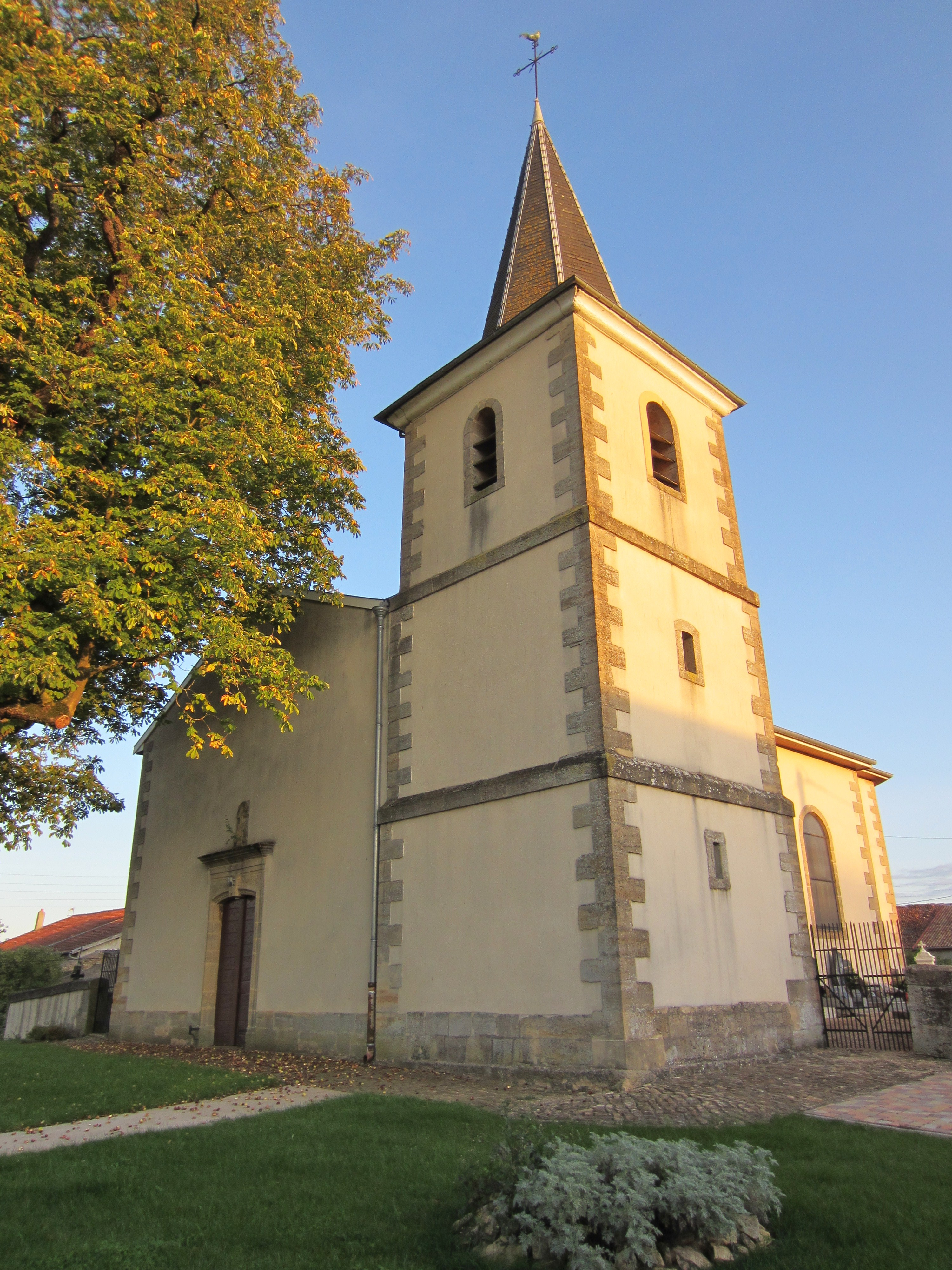 Description eglise Mouaville eglise Mouaville